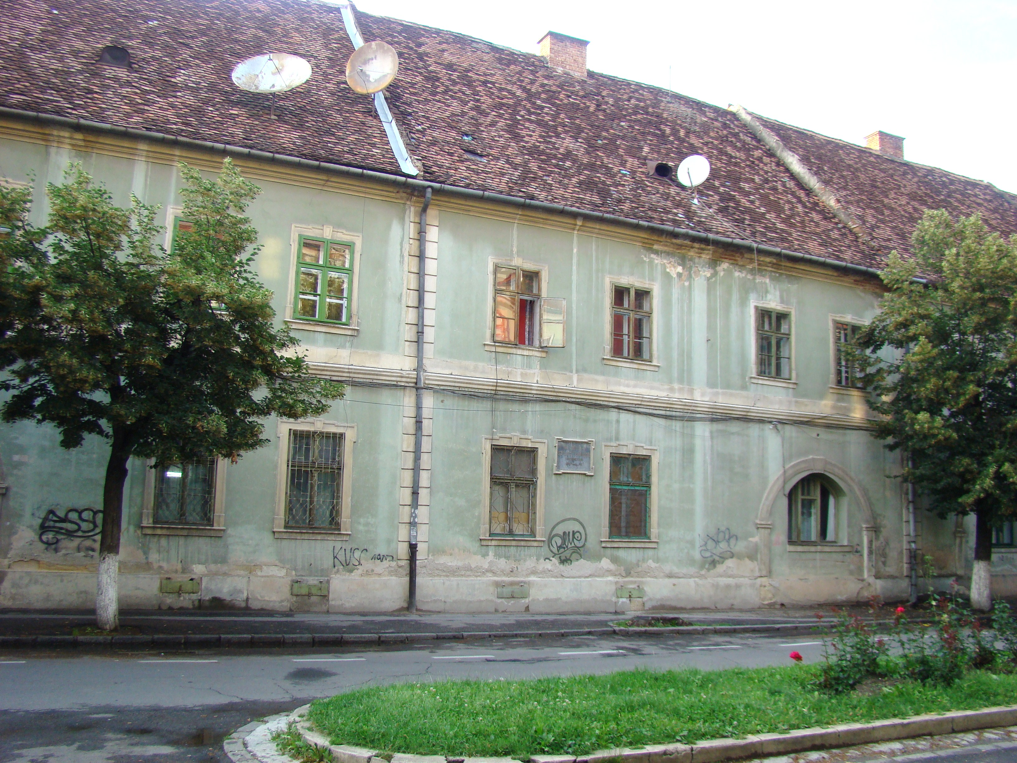 Casele Profesorilor reformați